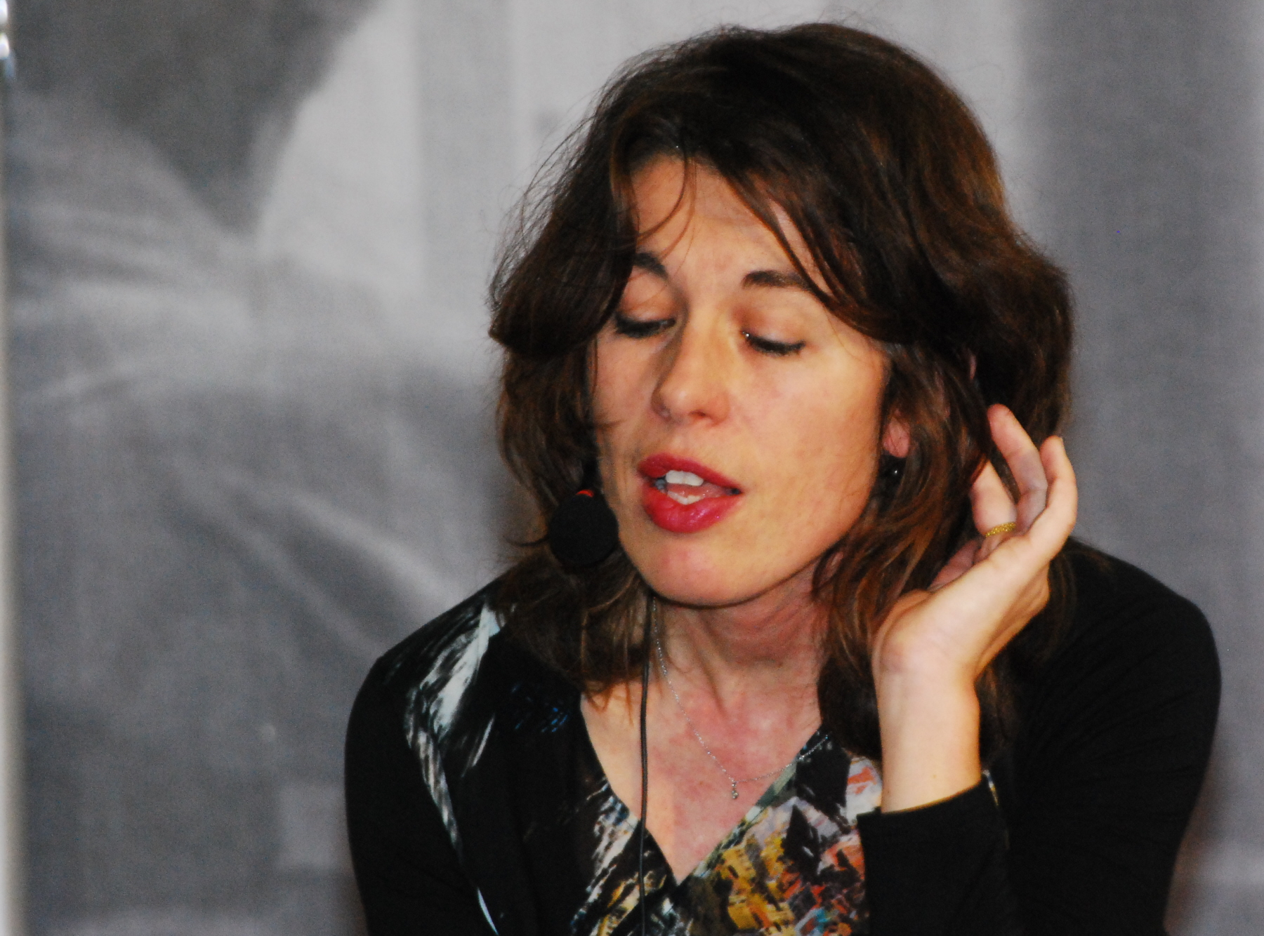 Andrea Grill, fotografiert auf der Buchmesse Buch Wien 12 auf dem Wiener Messegelände}